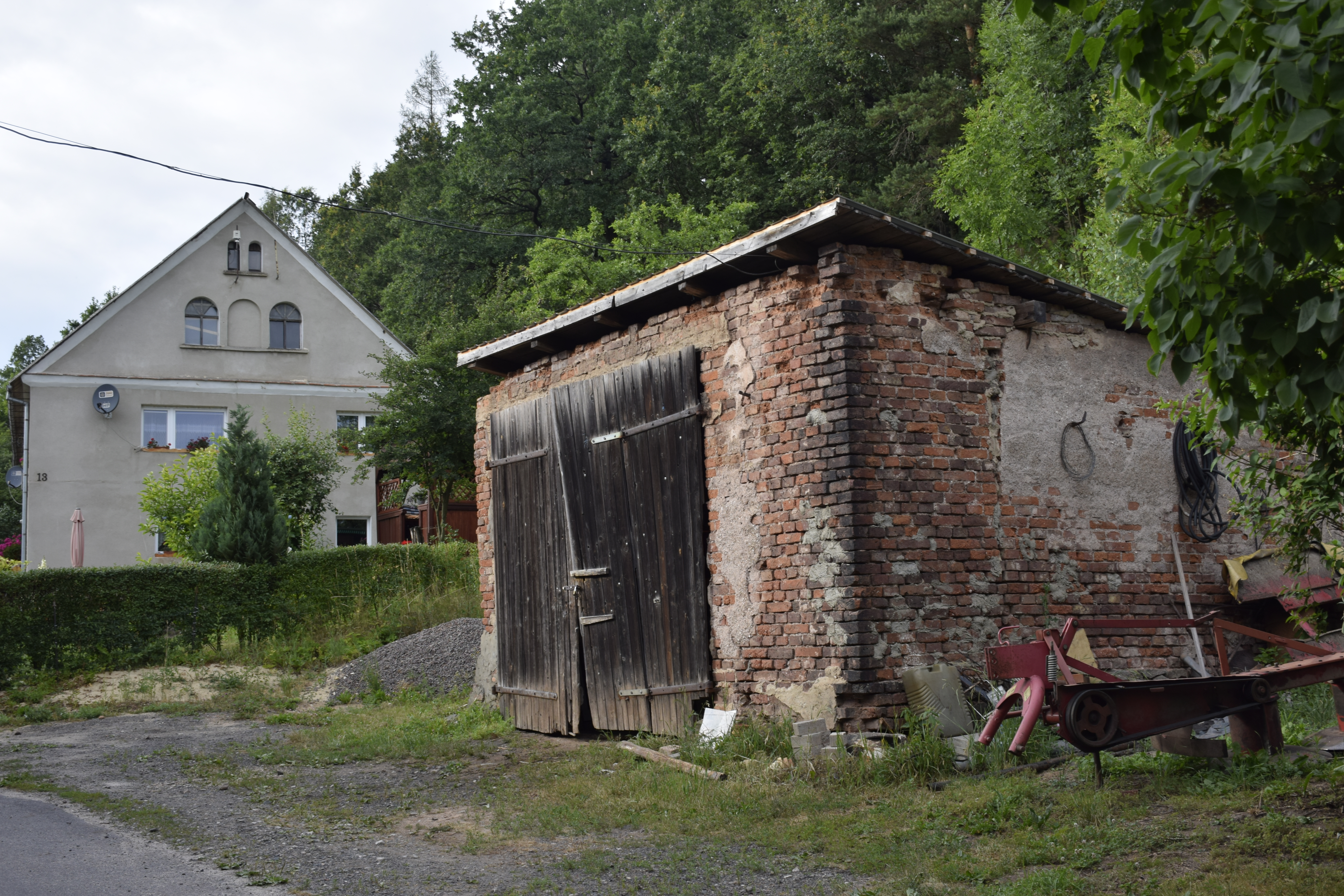 Wrony (województwo dolnośląskie) Polska.